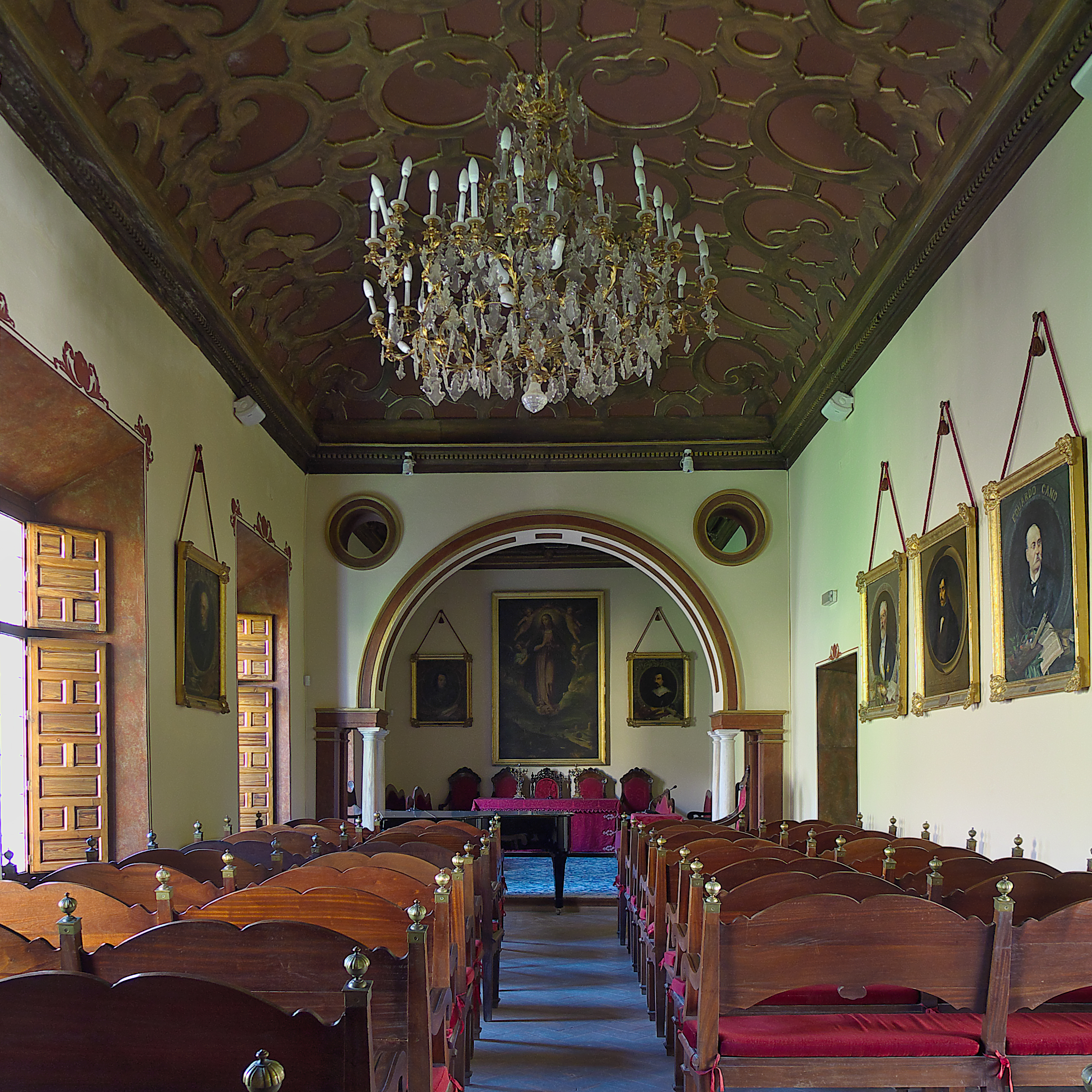 Uno de los salones de actos de la academia.